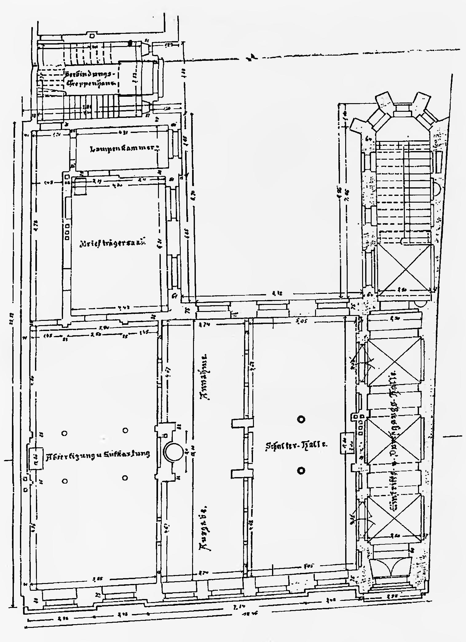 Rzut przyziemia z projektu budowy urzędu pocztowego w Toruniu (Rynek Staromiejski na dole planu)